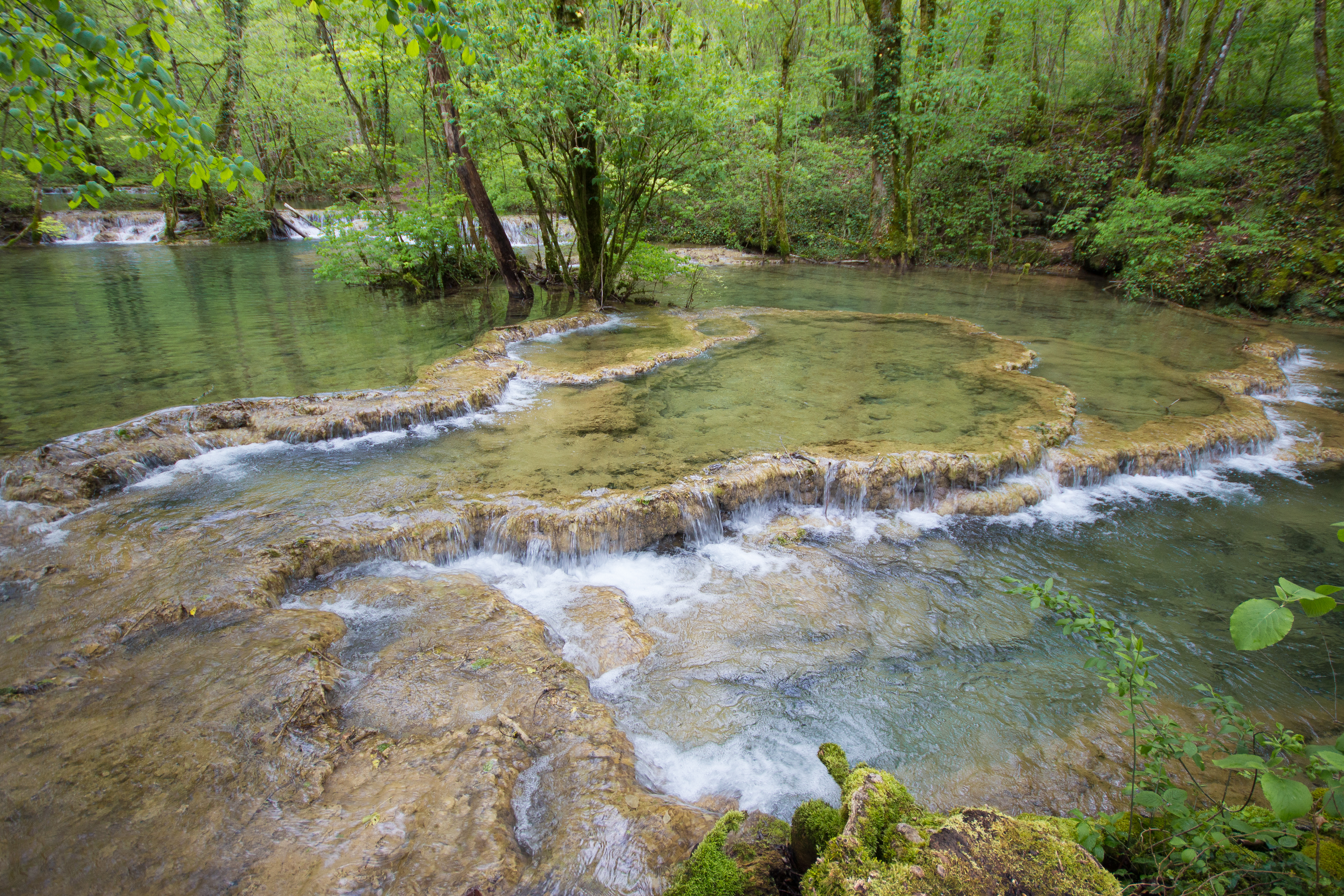 Les bassins de la Cuisance avant la Fontaine des Tufs. Les Planches près Arbois, Jura.